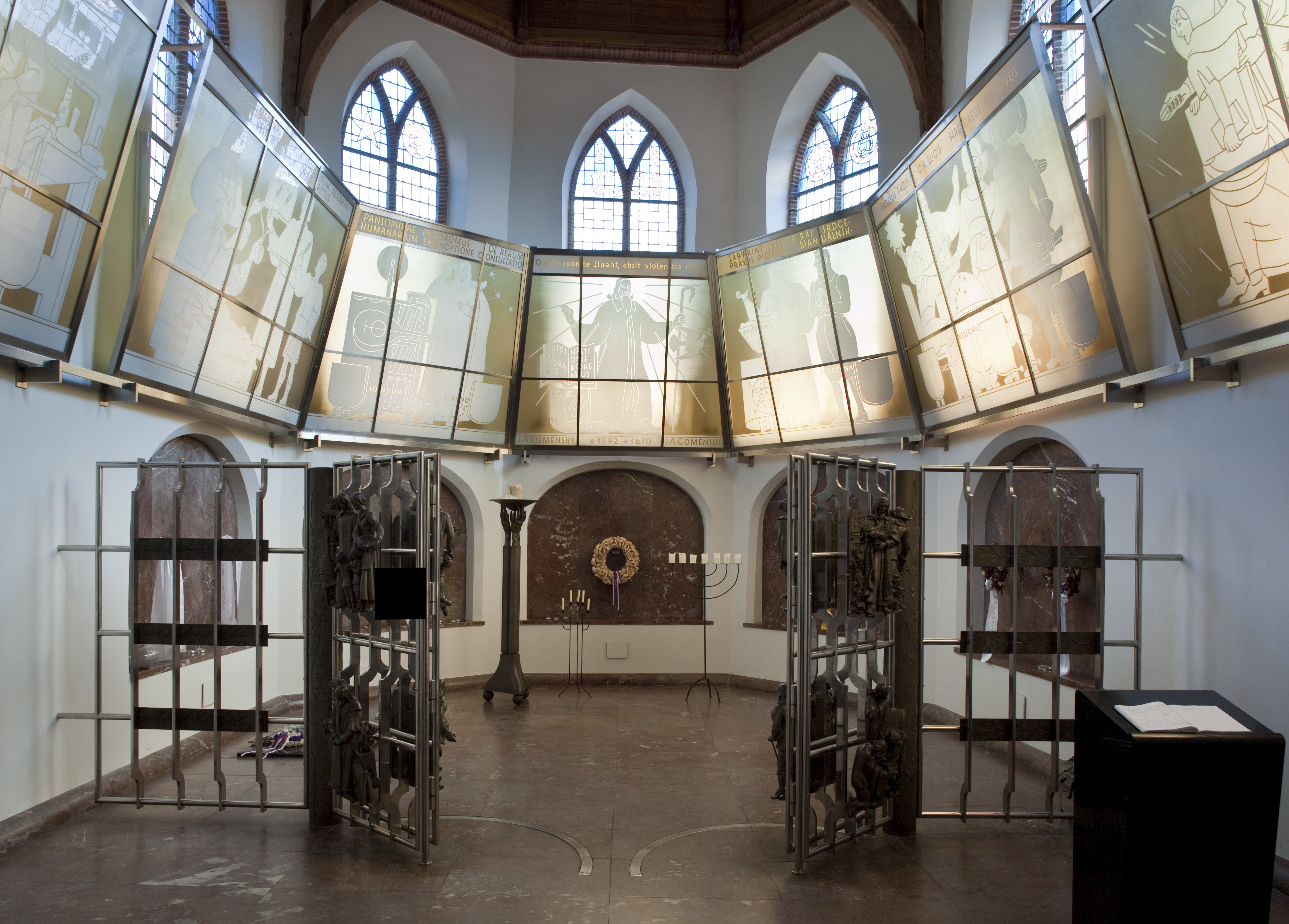 Comeniuskapel - Comenius-mausoleum: Interieur, overzicht van de kapel met de band met de zeven glazen panelen (opmerking: Gefotografeerd t.b.v. Tijdschrift Rijksdienst voor het Cultureel Erfgoed)